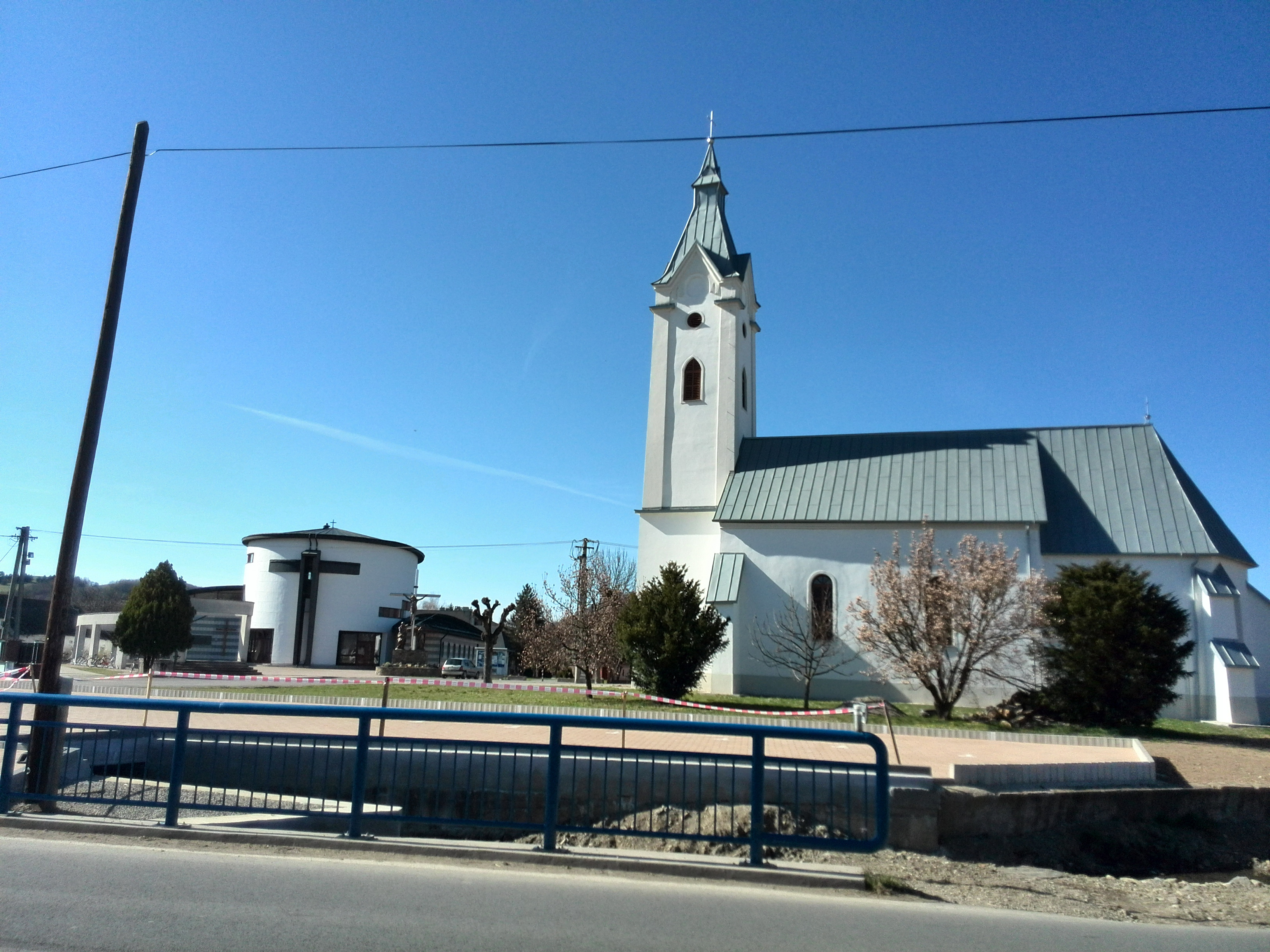 Námestie Jána Tomka Dlhé nad Cirochou